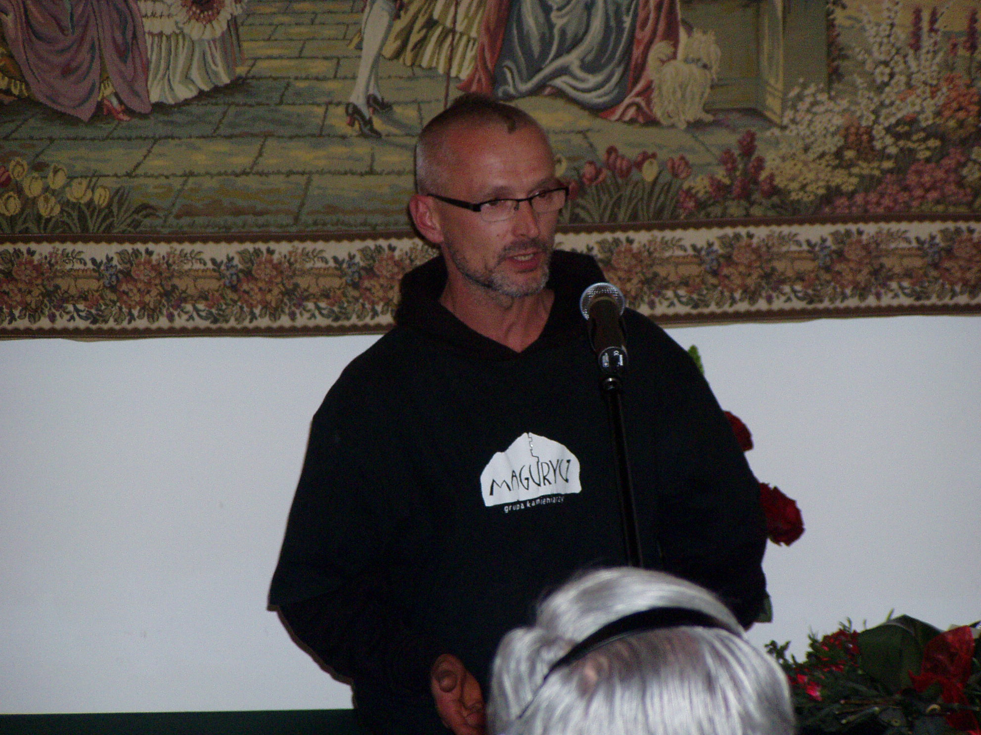 Szymon Modrzejewski - szef Stowarzyszenia Magurycz